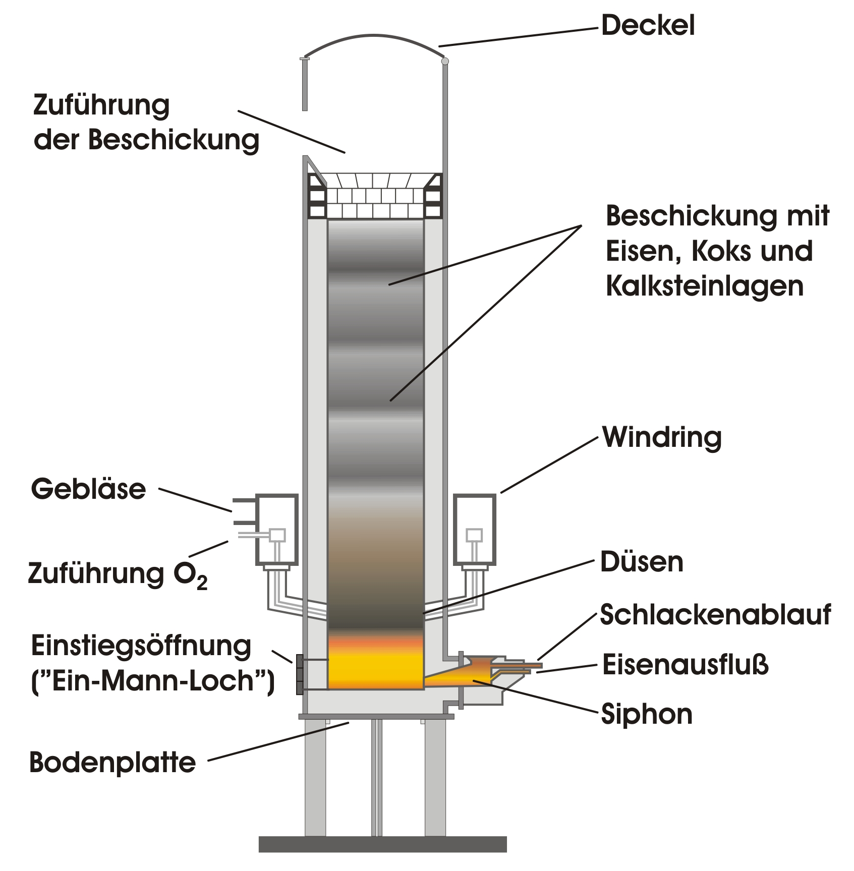 Wichtige Elemente eines Kupolofens